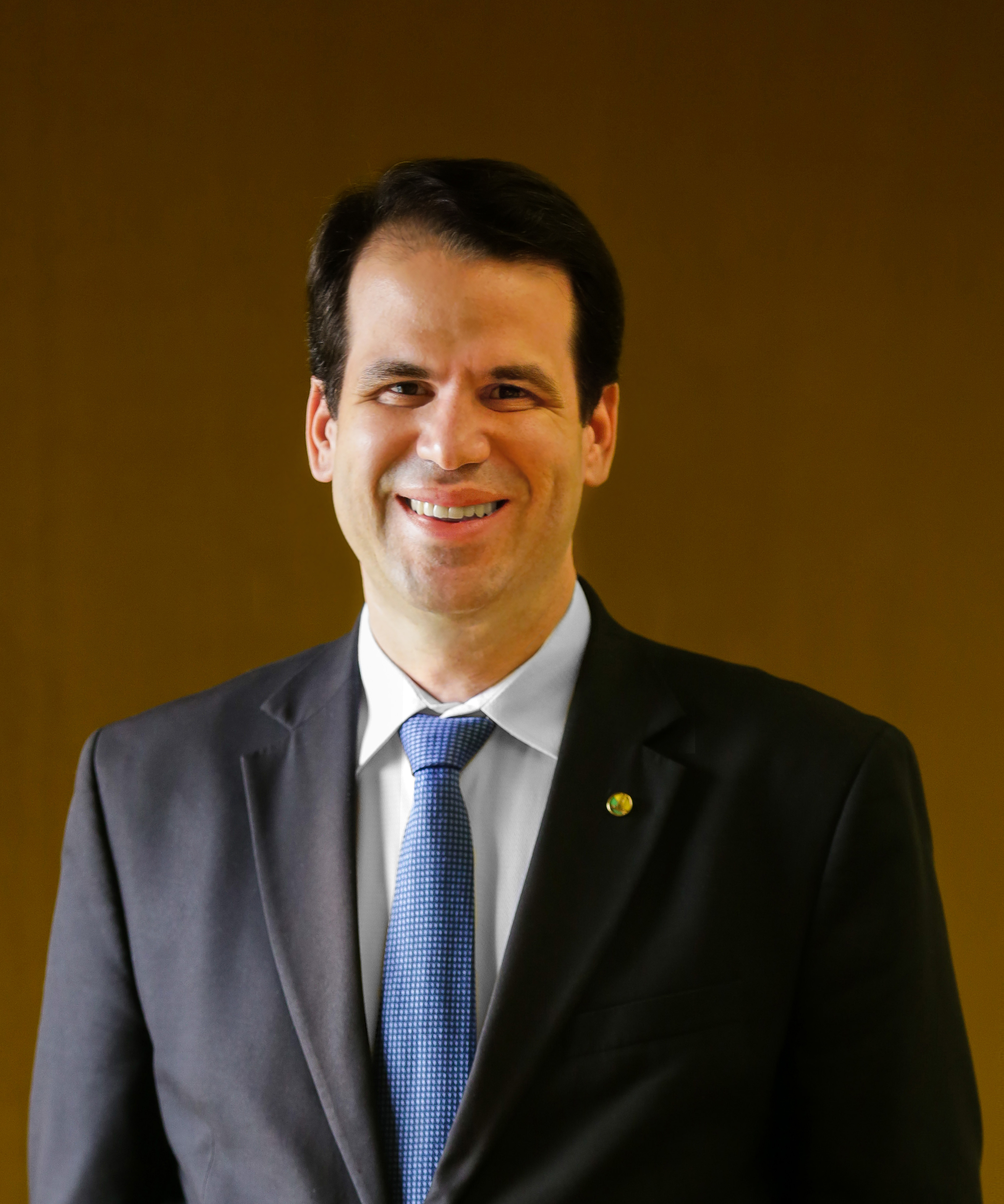 imagem do deputado federal Aureo